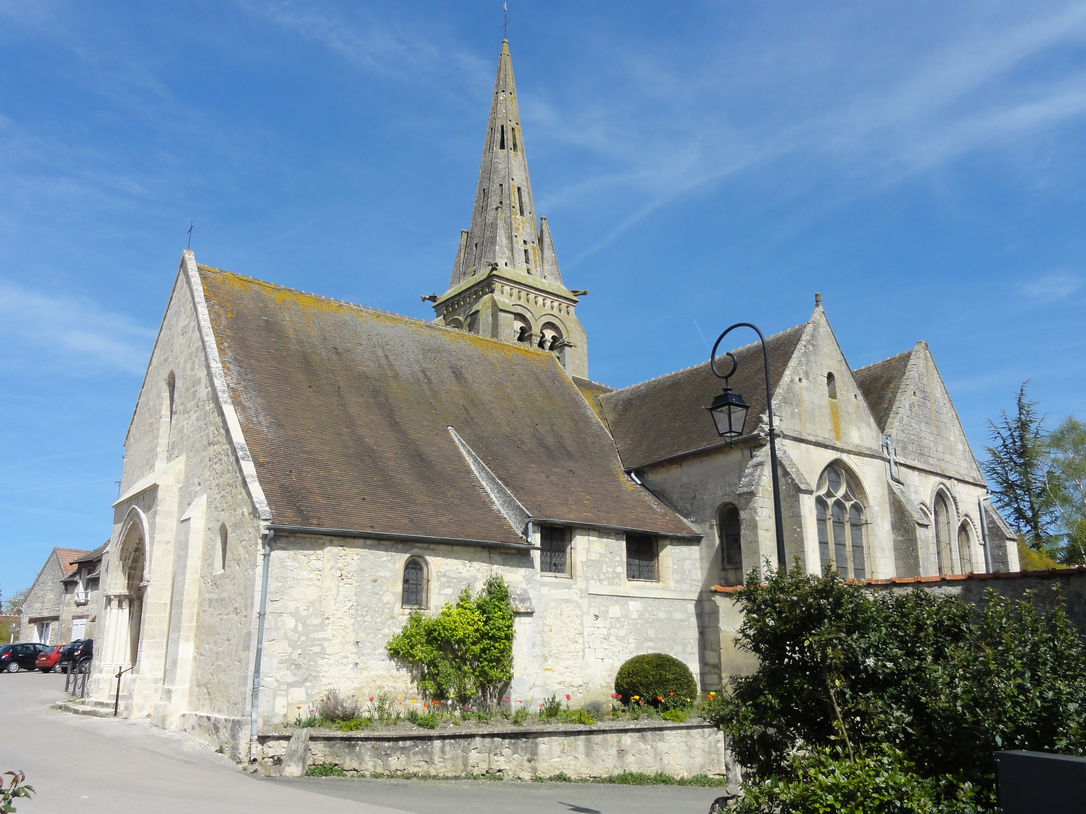 Église Saint-Caprais d'Auger-Saint-Vincent (voir titre).